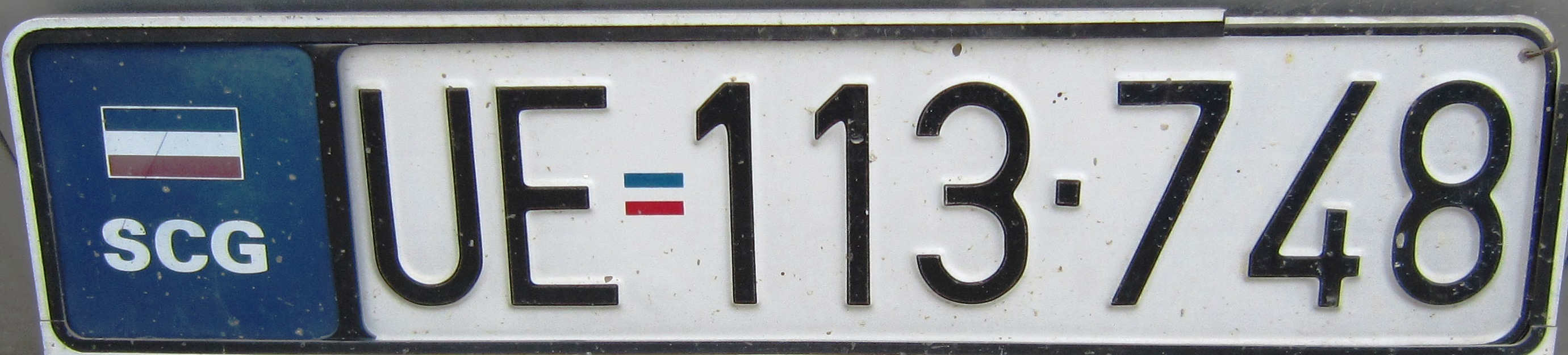 Servië en Montenegro kenteken (Užice)